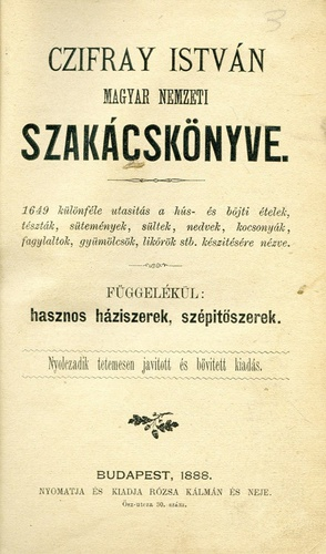 Czifray klasszikus magyar nemzeti szakácskönyve